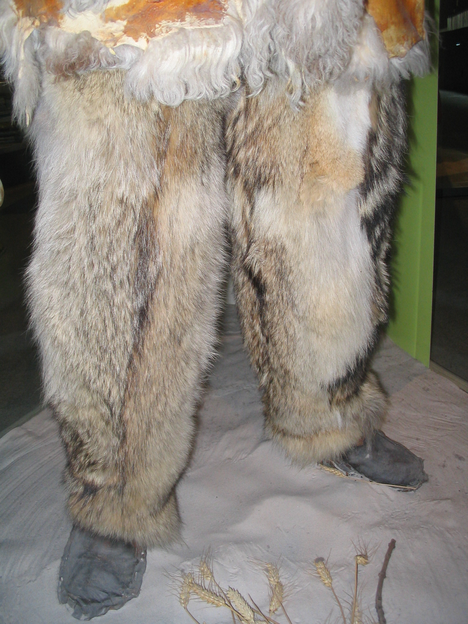 Pelze und Felle im Neandertal Museum, Talstraße 300, 40822 Mettmann.